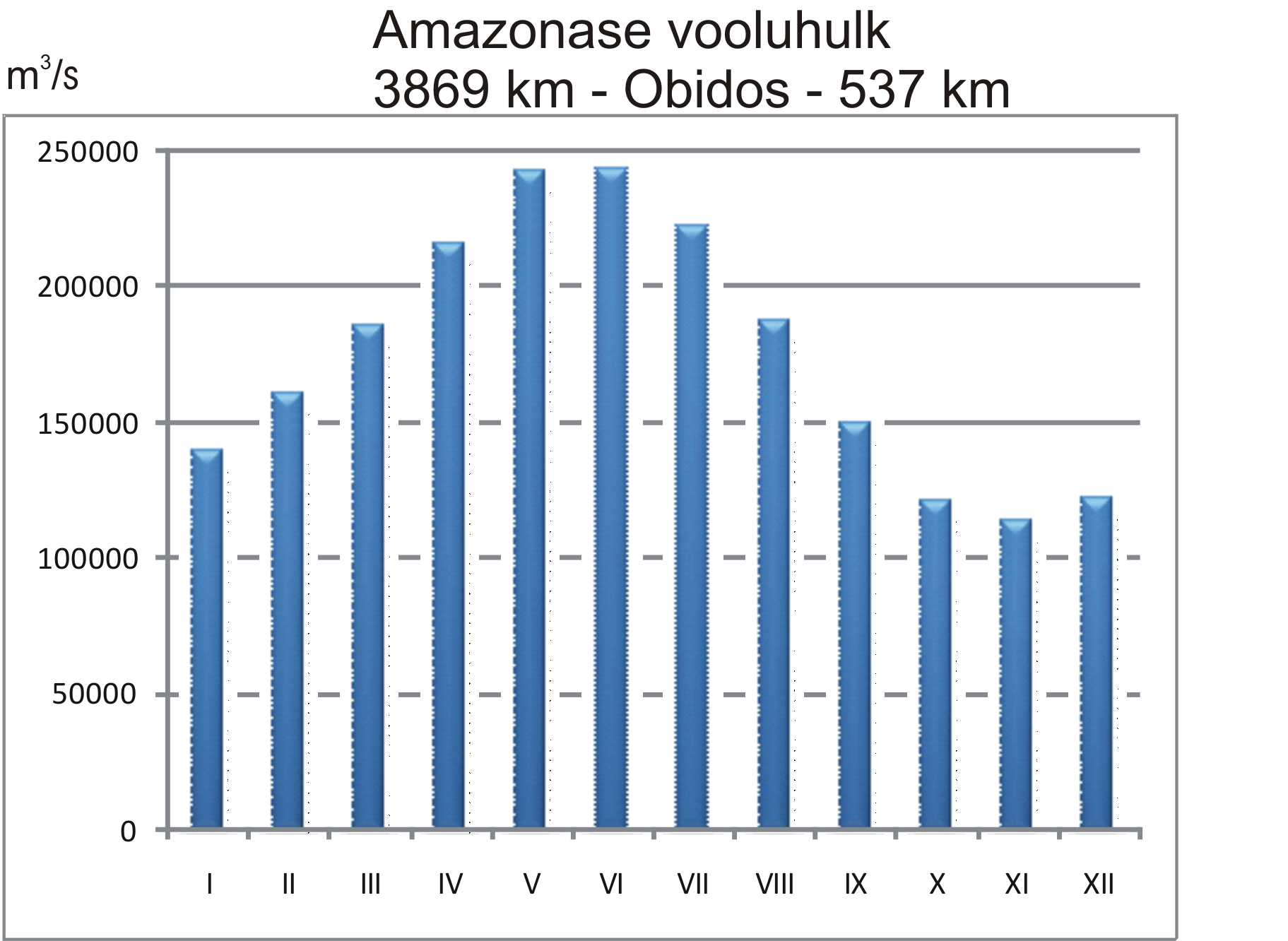 Amasonase hüdrograaf